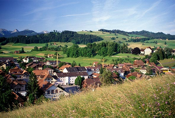 Riggisberg; im Hintergrund die Voralpen (Gantrischgebiet)